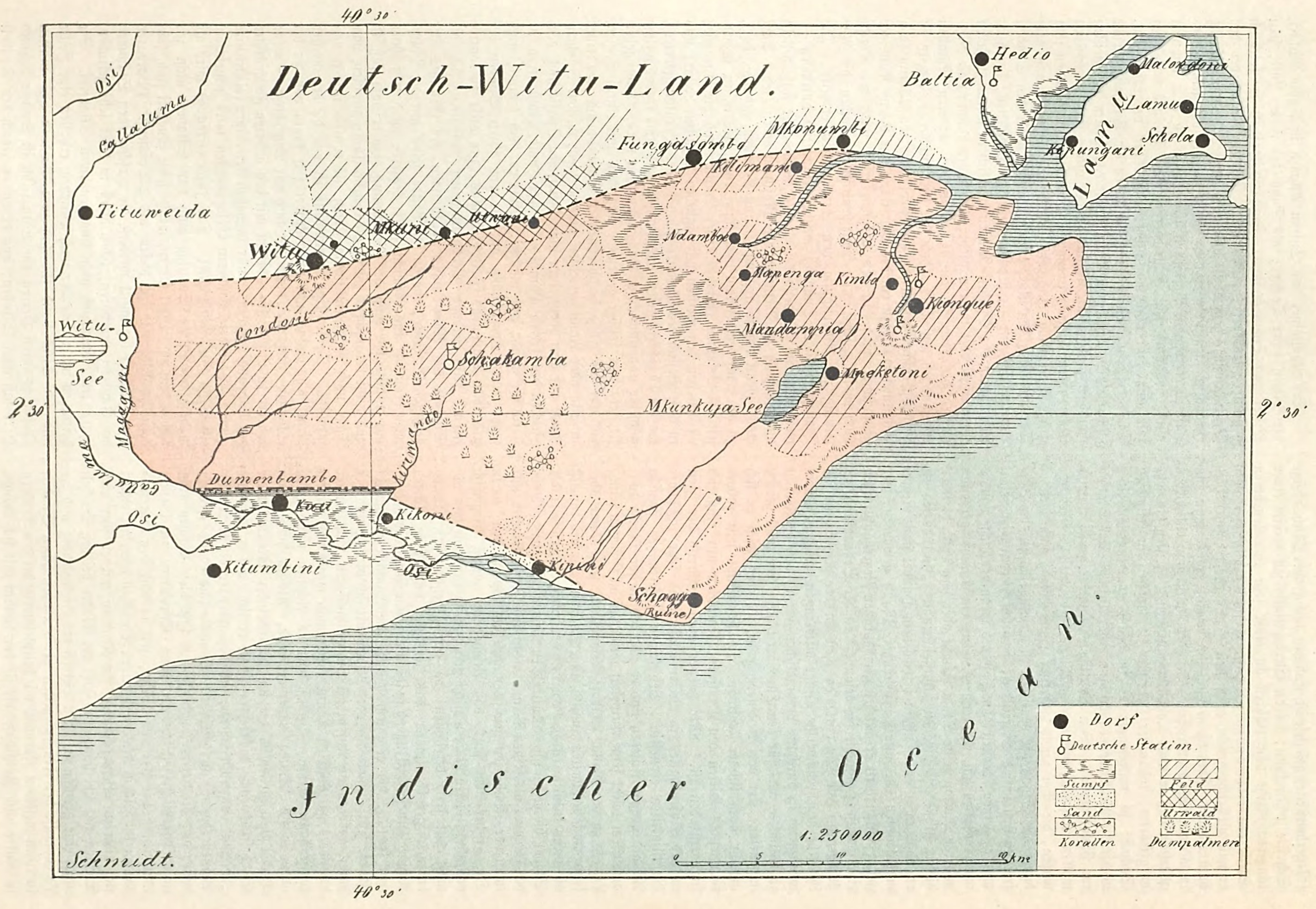 Karte von Deutsch-Wituland